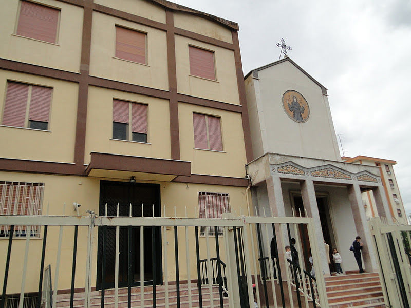 La chiesa di Santa Macrina e il collegio delle suore basiliane italo-albanesi di Palermo.